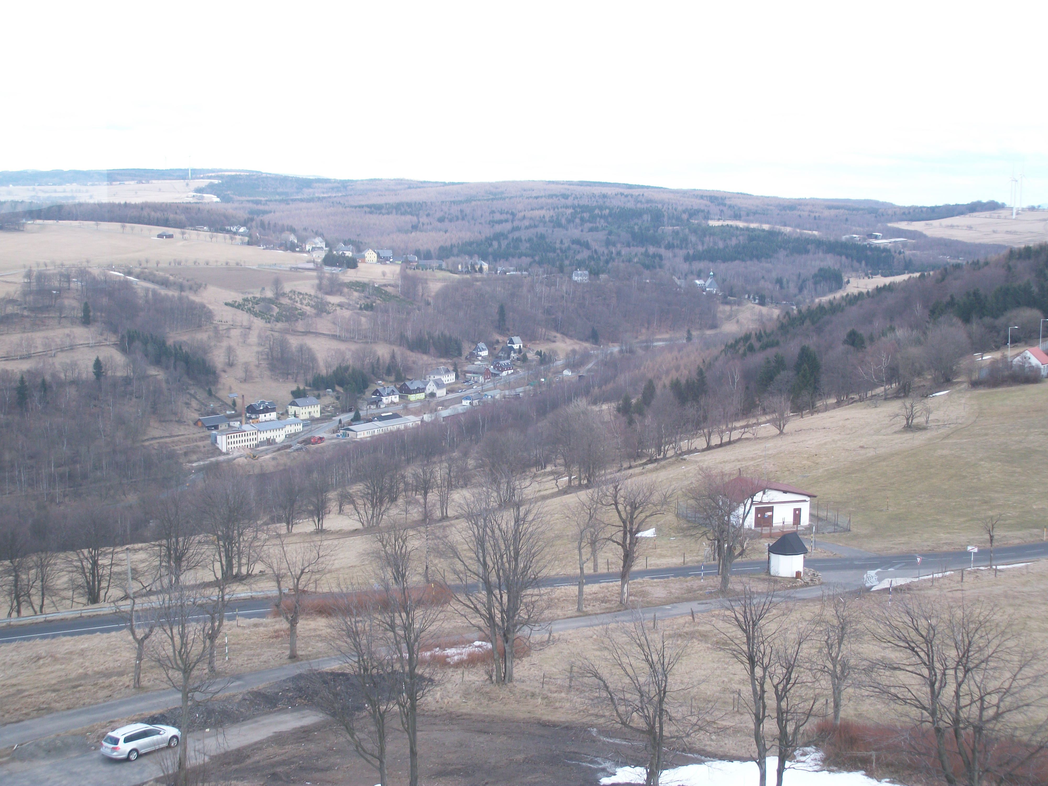 View from Růžový vrch to former Deutschneudorf train station